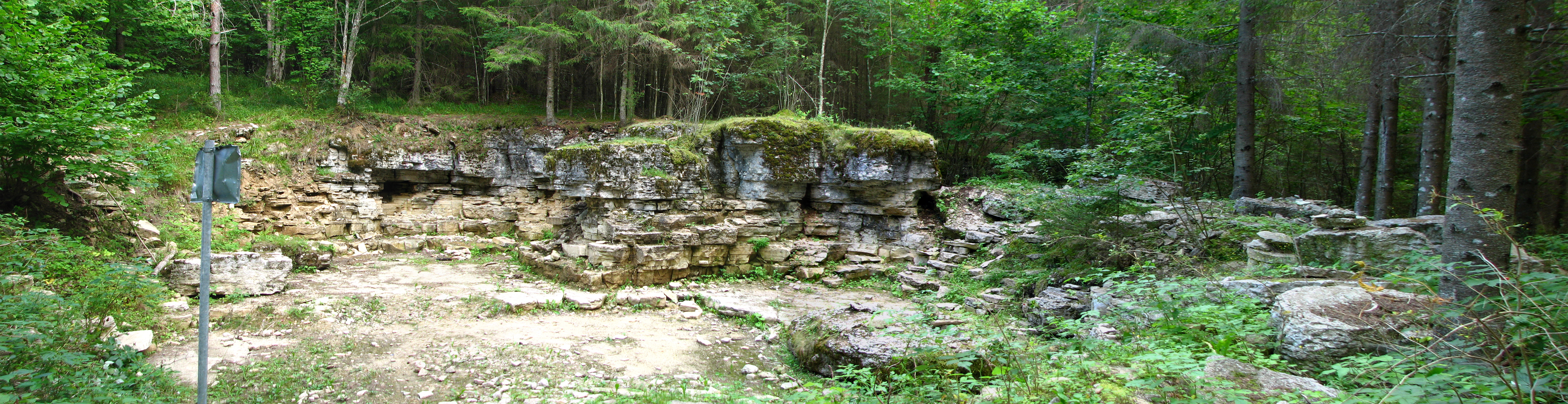 Raikküla Pakamägi